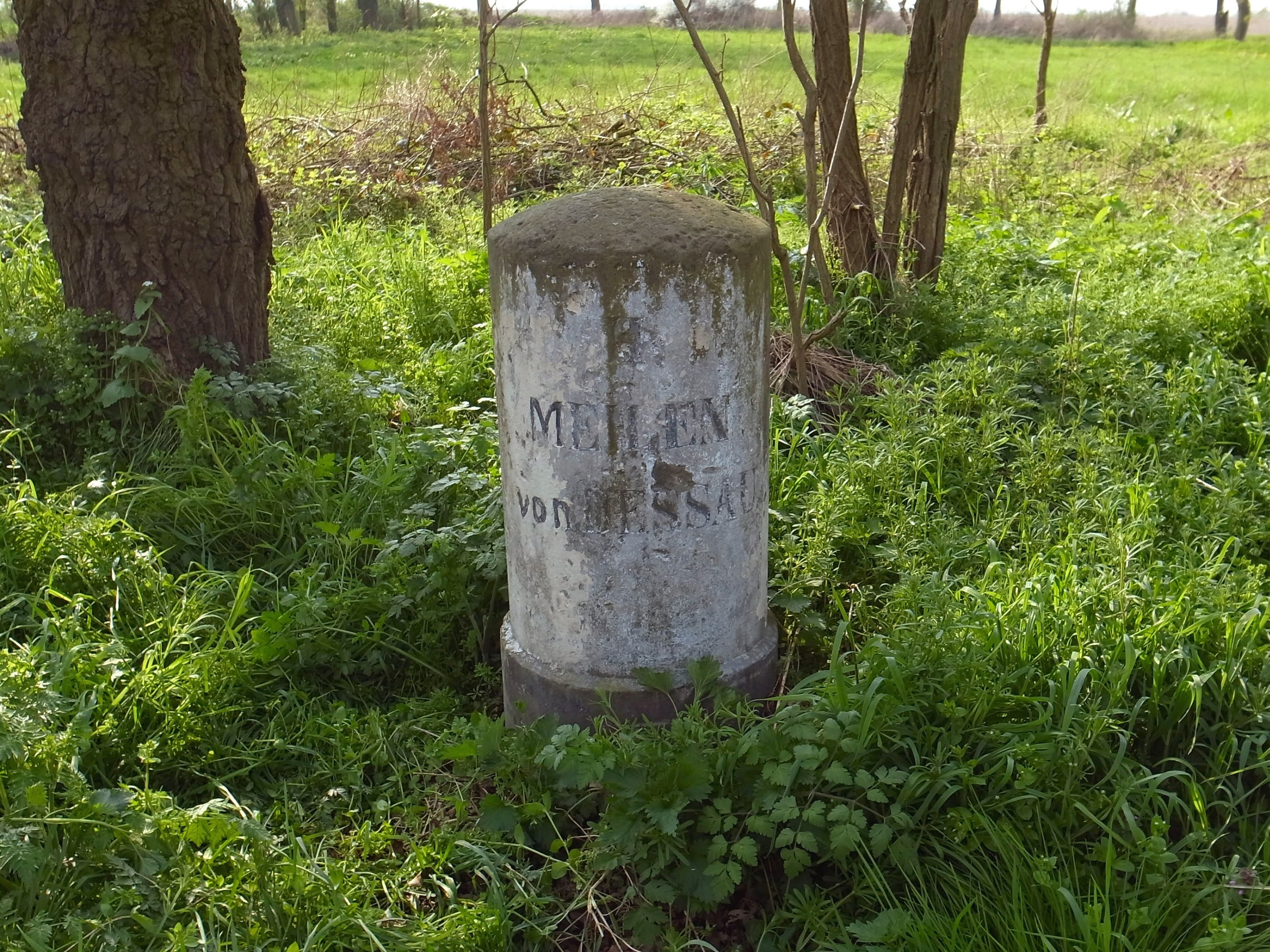 Anhaltischer Meilenstein zwischen Quellendorf und Frasdorf, II Meilen von Dessau